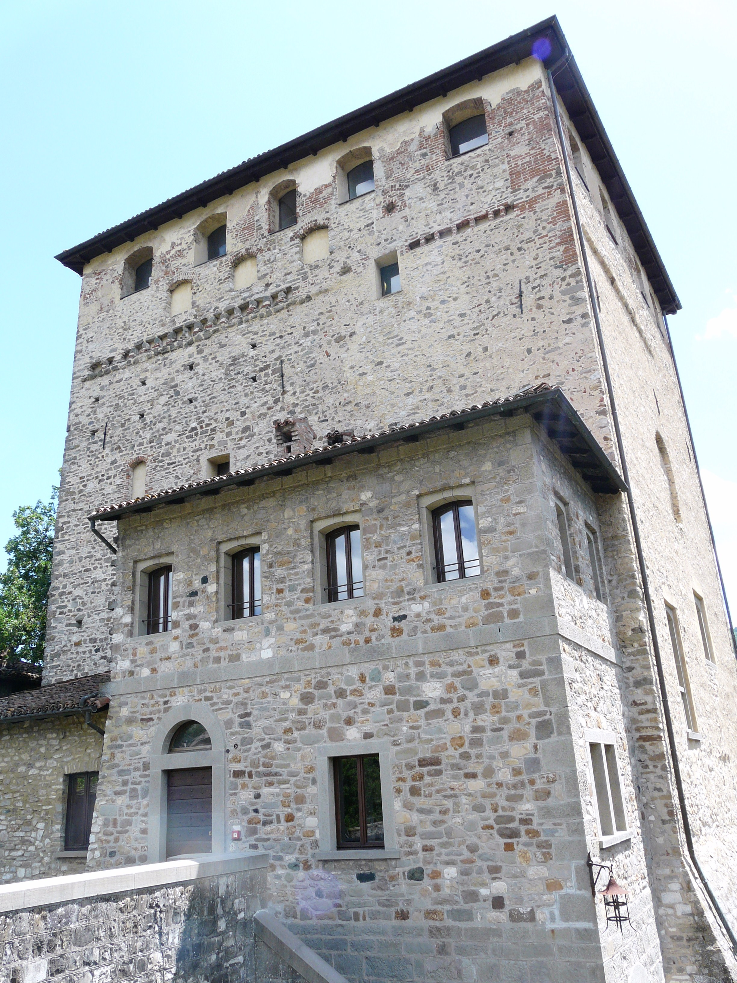 Immagini del castello malaspiniano di Bobbio, Emilia-Romagna, Italia